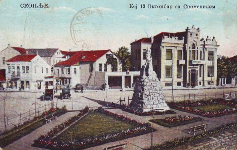 Стара слика на плоштадот „Карпошово востание“ во Скопје. Отоманската банка (на местото на денешна комерцијална банка)